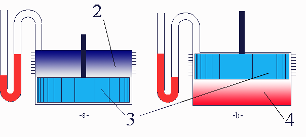 Zjednodušená funkčná schéma princípu Stirlingovho motora